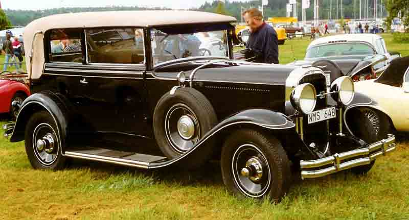 Buick Series 40 Cabriolet Gläser 1930